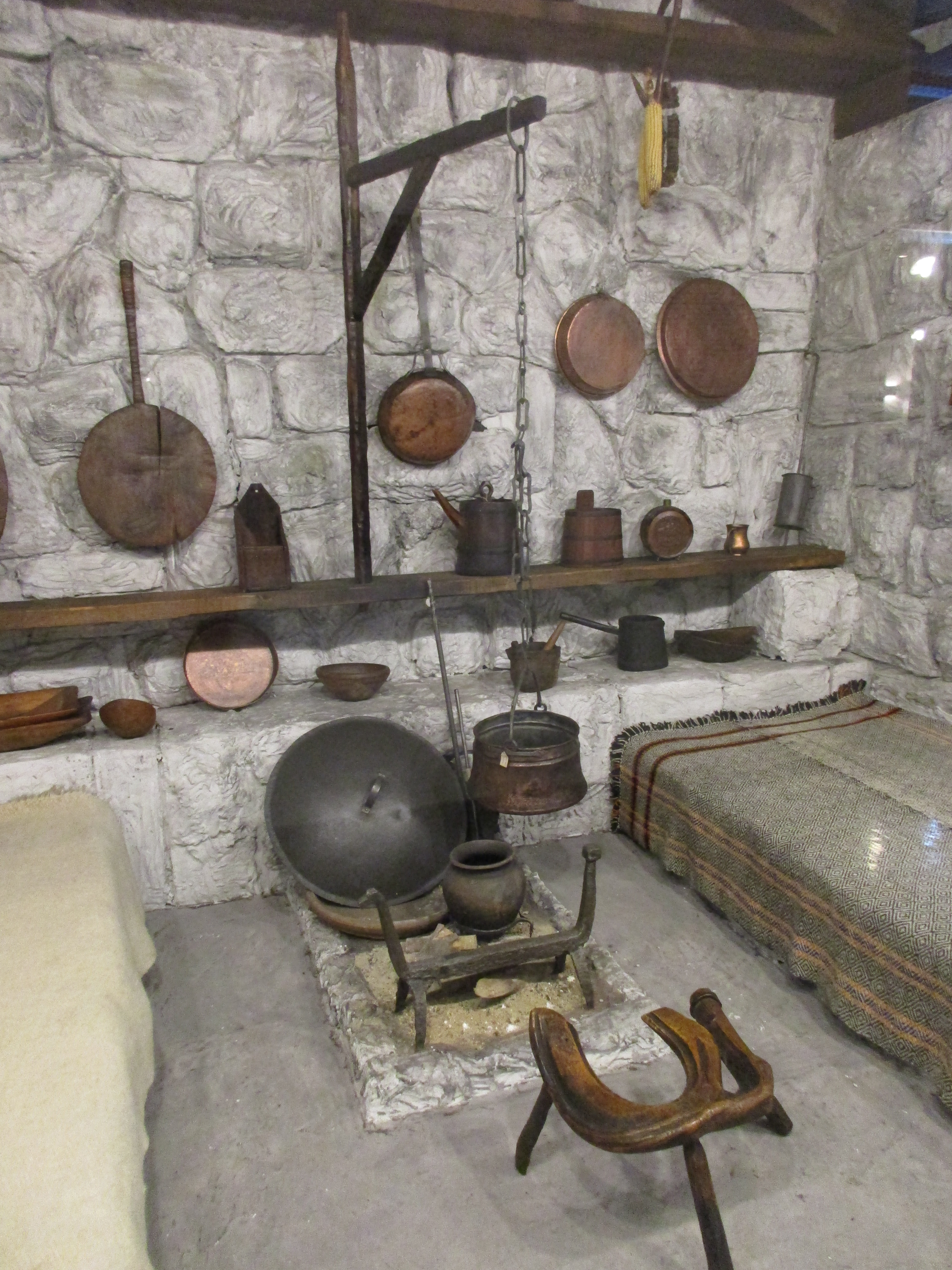 Srpski (latinica): Etnografski muzej, Beograd